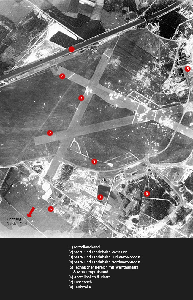 Luftaufnahme vom Flugplatz Achmer im 2. Weltkrieg.